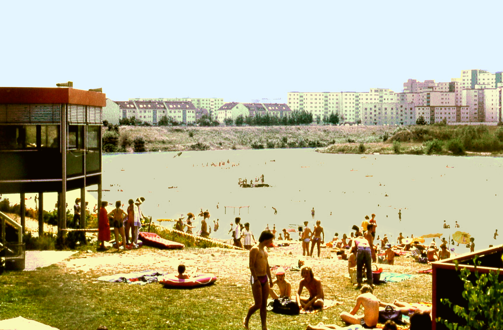 Badesee Rodgau (Hessen) (Deutschland): Strandbad 1981.